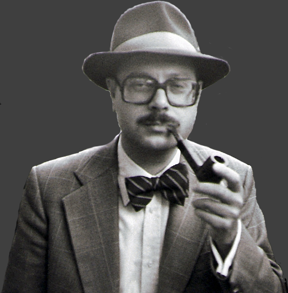 1983 aufgenommen bei der Tagung des Engeren Kreises der Allgemeinen Gesellschaft für Philosophie.Scheier hat seit 1982 den Lehrstuhl für Philosophie an der Technischen Universität Carolo-Wilhelmina zu Braunschweig. Seit 1990 ordentliches Mitglied, von 2001 bis 2012 Generalsekretär der Braunschweigischen Wissenschaftlichen Gesellschaft (BWG).